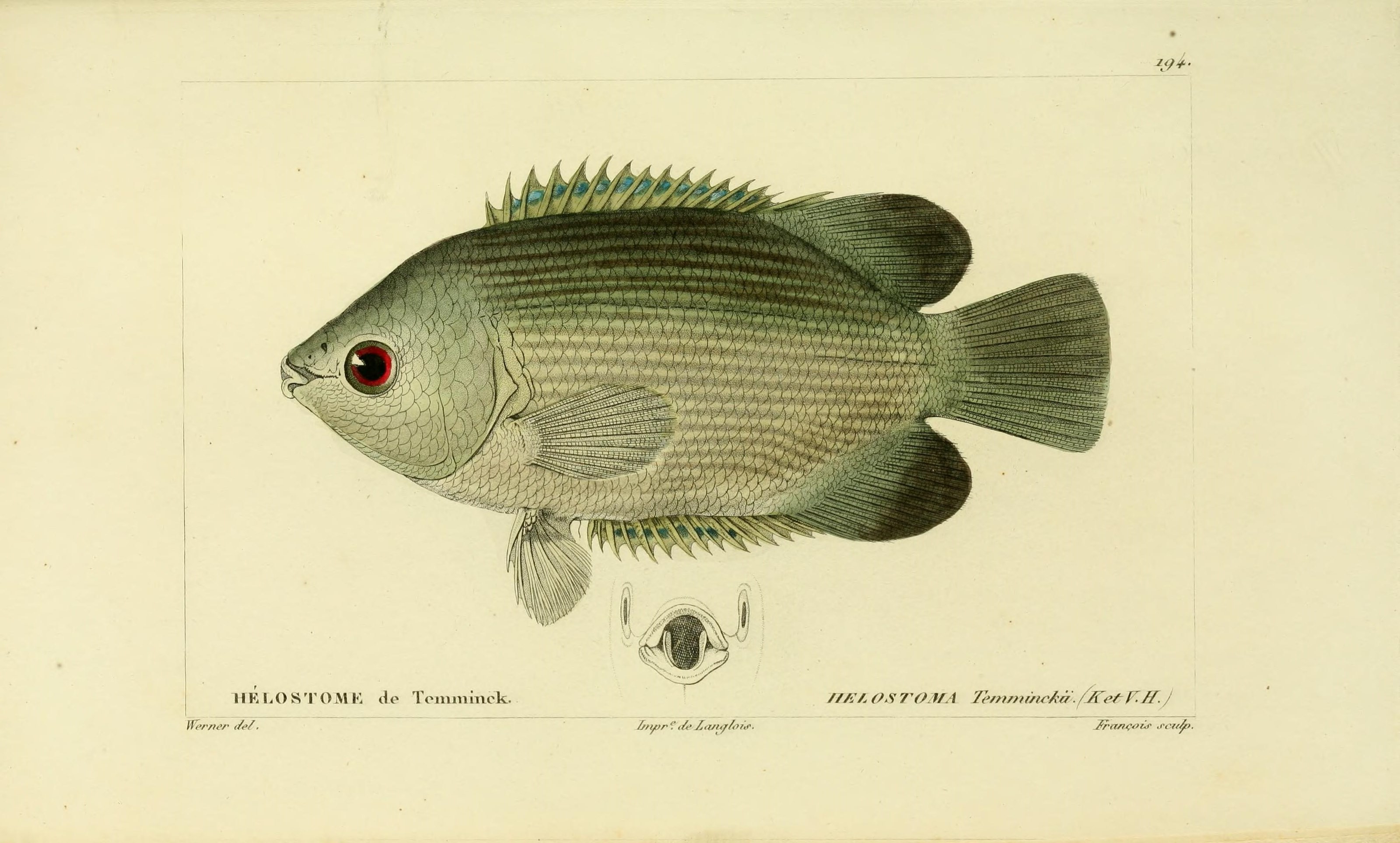 Histoire naturelle des poissons / par m. le bon Cuvier ... et par M. Valenciennes.